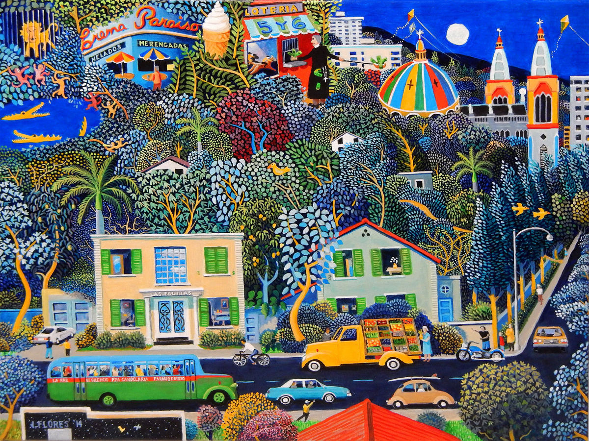 Memorias de la Avenida "B" del Pinar, El Paraíso, Caracas, Venezuela. El frutero ambulante, el autobus "Paraiso Directo", el Zoologico del Pinar, la Iglesia de la Coromoto, el panadero de motocicleta, el 5 y 6, y Crema Paraiso eran parte de la vida cotidiana durante los 60s y 70s.